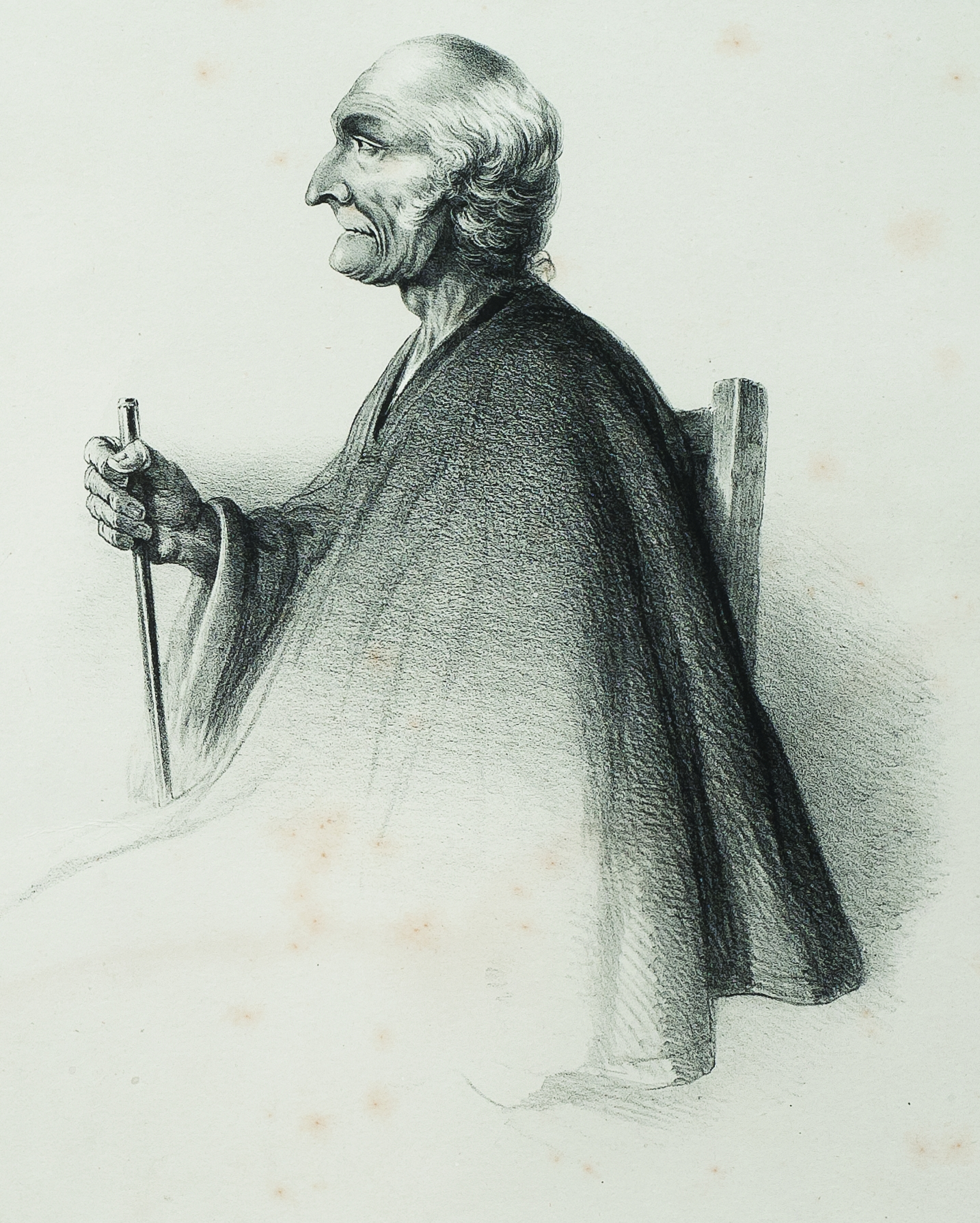 Único retrato de José Gervasio Artigas hecho en vida, realizado por el viajero francés Alfredo Demersay.